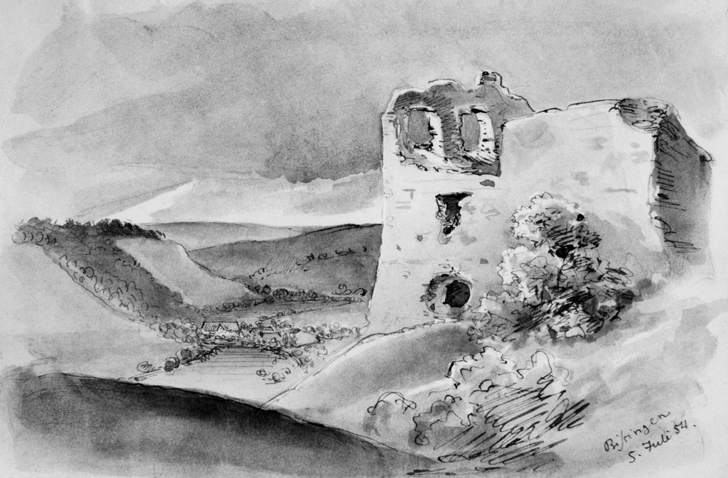 Bissingen an der Teck: Ruine Rauber (Schefold Nr. 649a, Aquarell 12,4 x 19,5 cm; Skizzenbuch 3 Bl. 21, Sammlung Hagmayer)